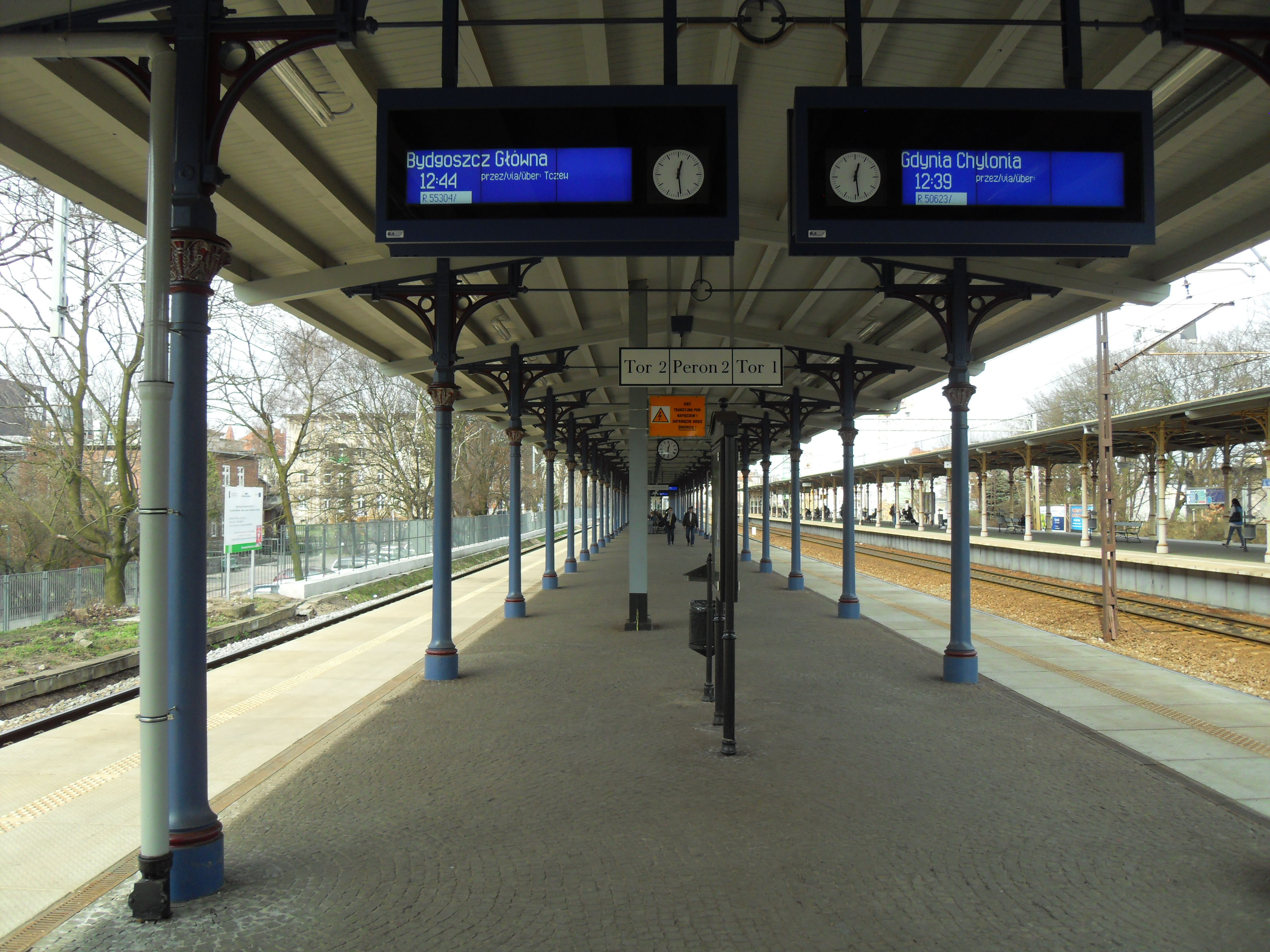 Stacja kolejowa Sopot, peron dalekobieżny po remoncie.